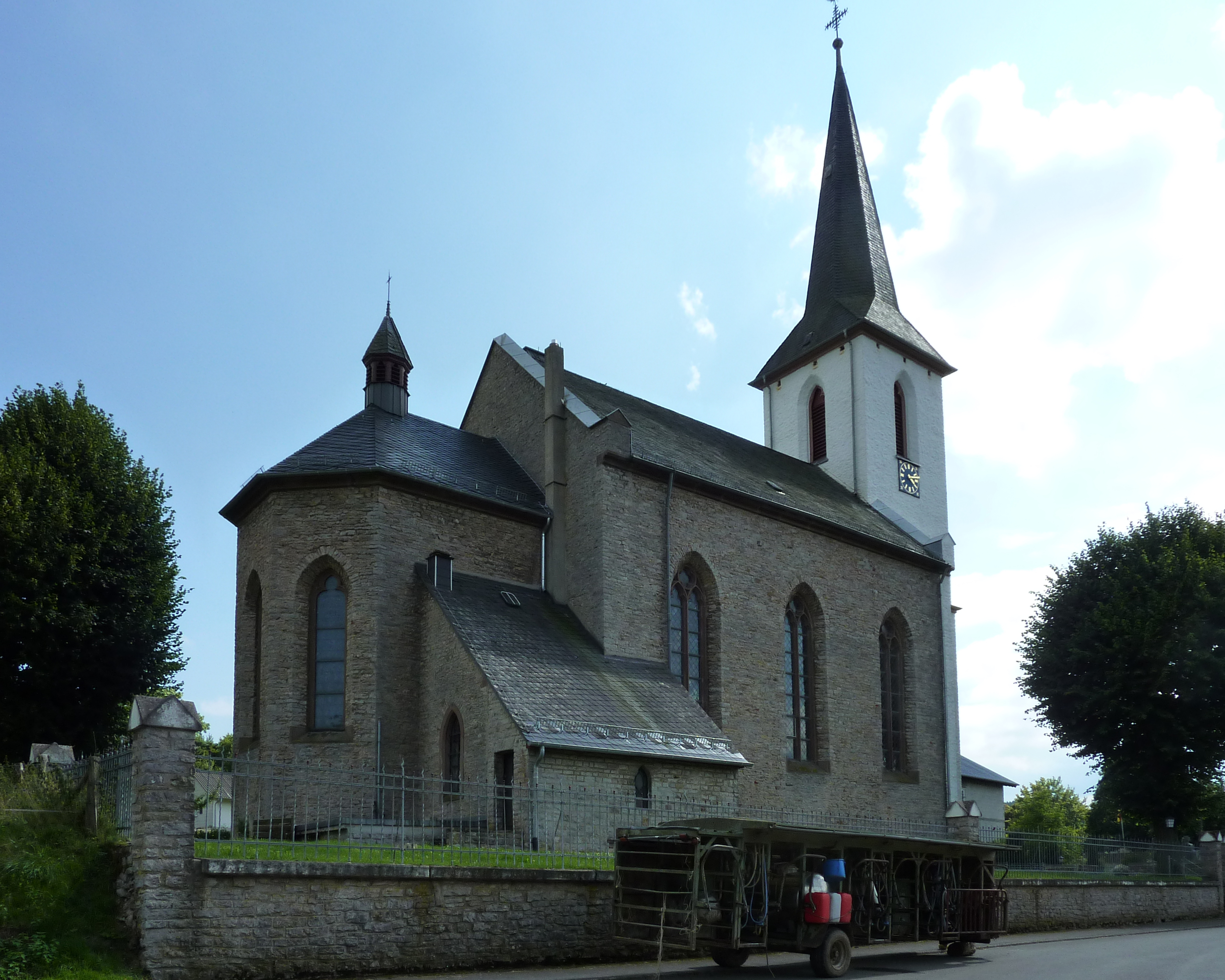 Rohr, Wendelinusstr. 1; kath. Pfarrkirche 7, von NO